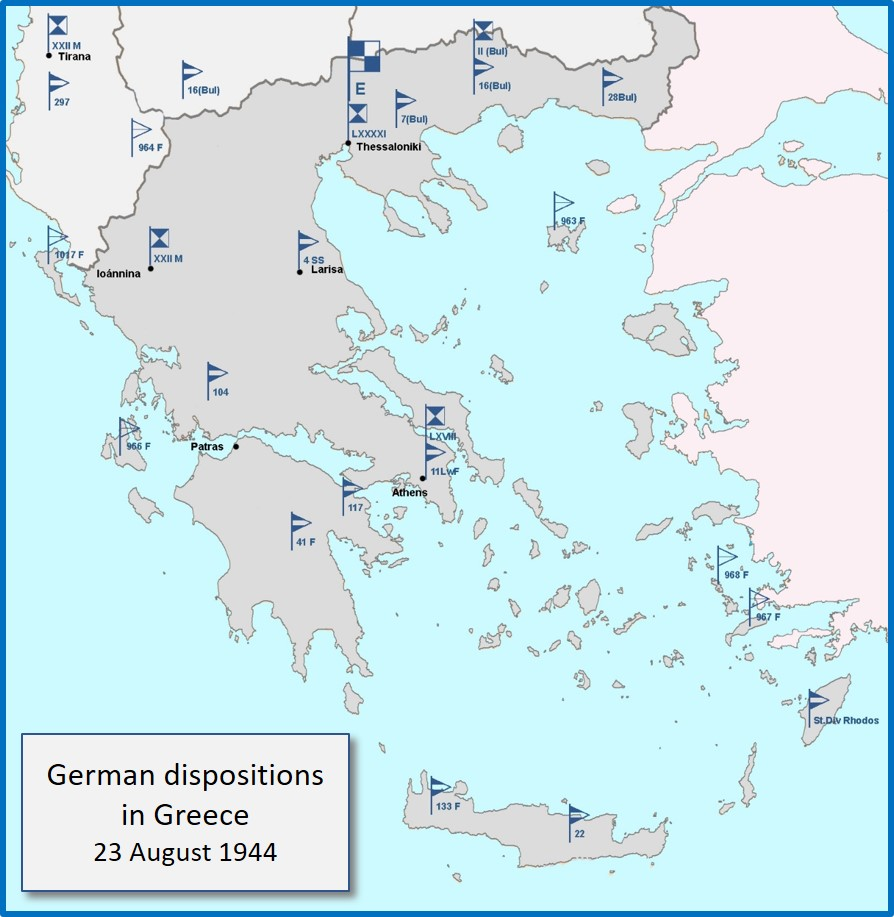 German dispositions in Greece 23 August 1944